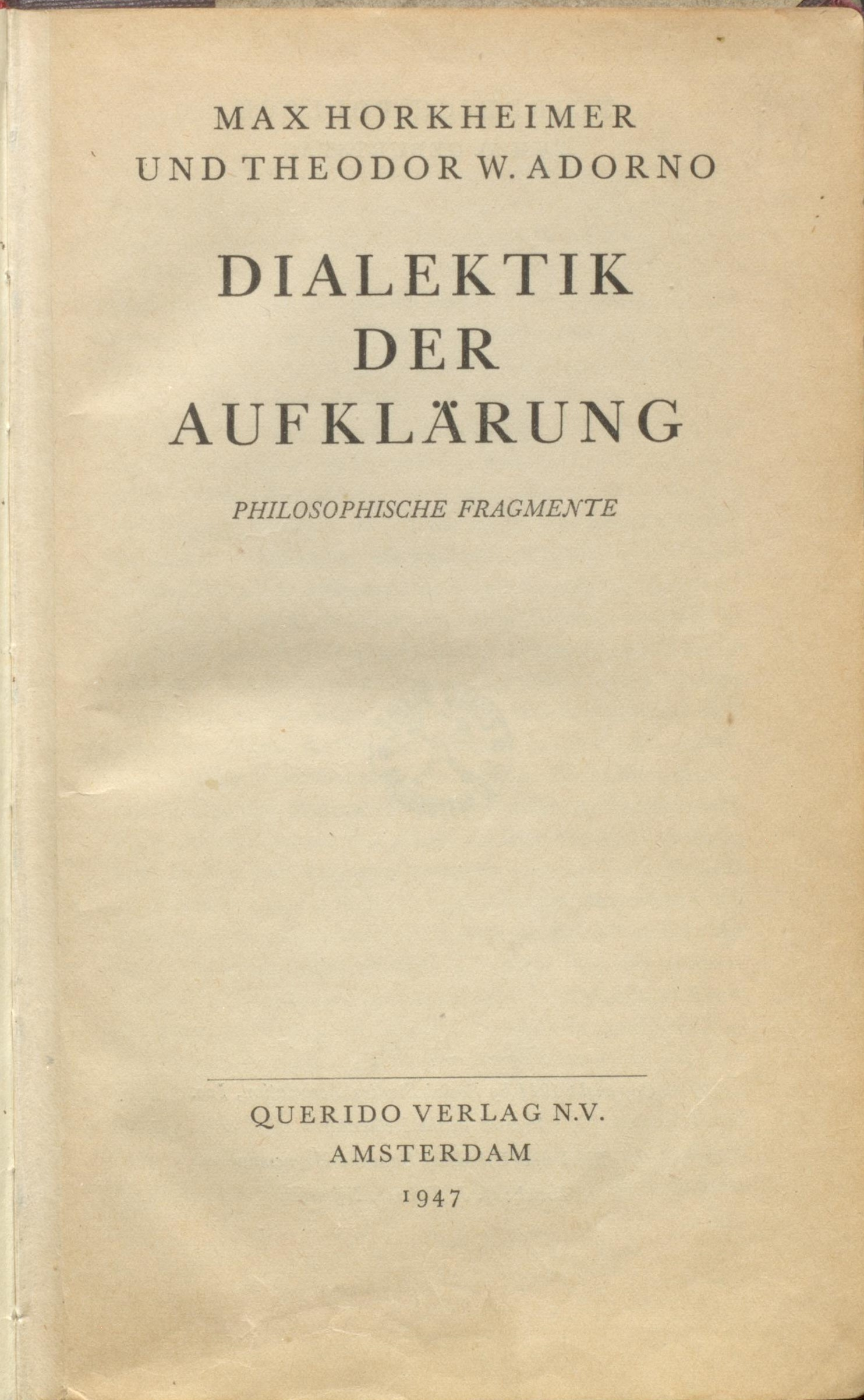 Max Horkheimer Theodor W. Adorno Dialektik der Aufklärung 1947 Titel